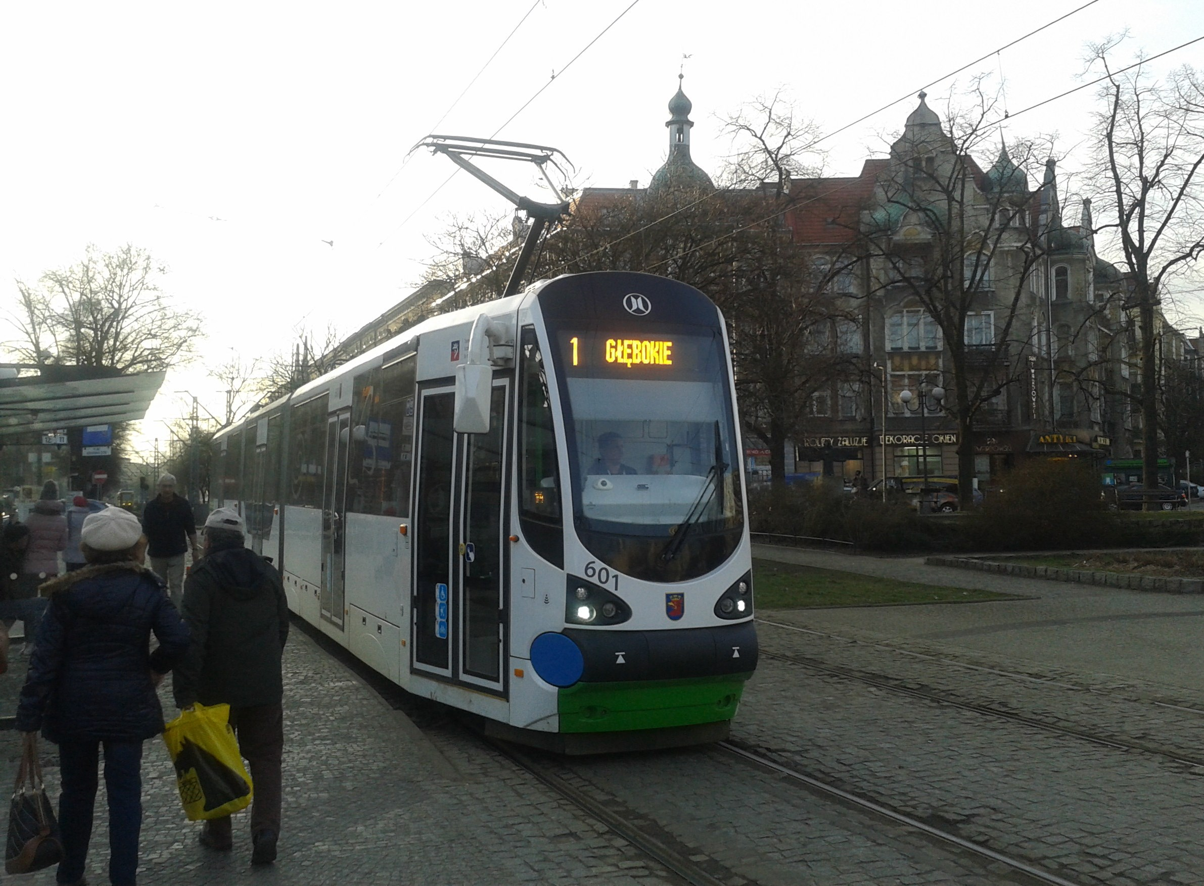 Moderus Beta w Szczecinie